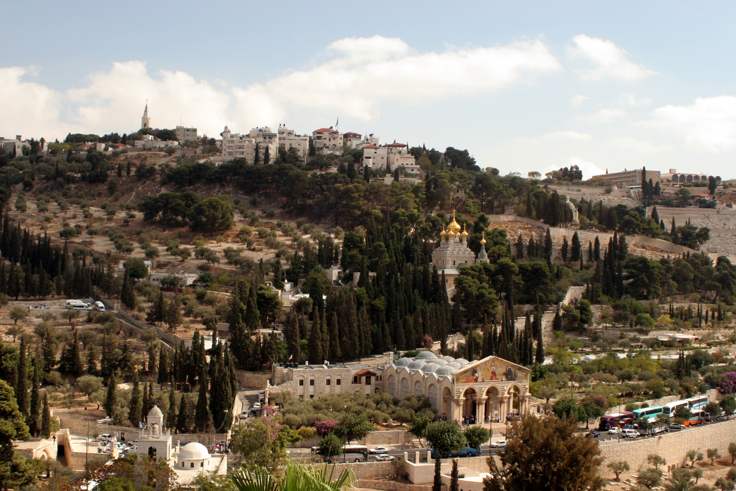 IMG_4591 Jerusalem